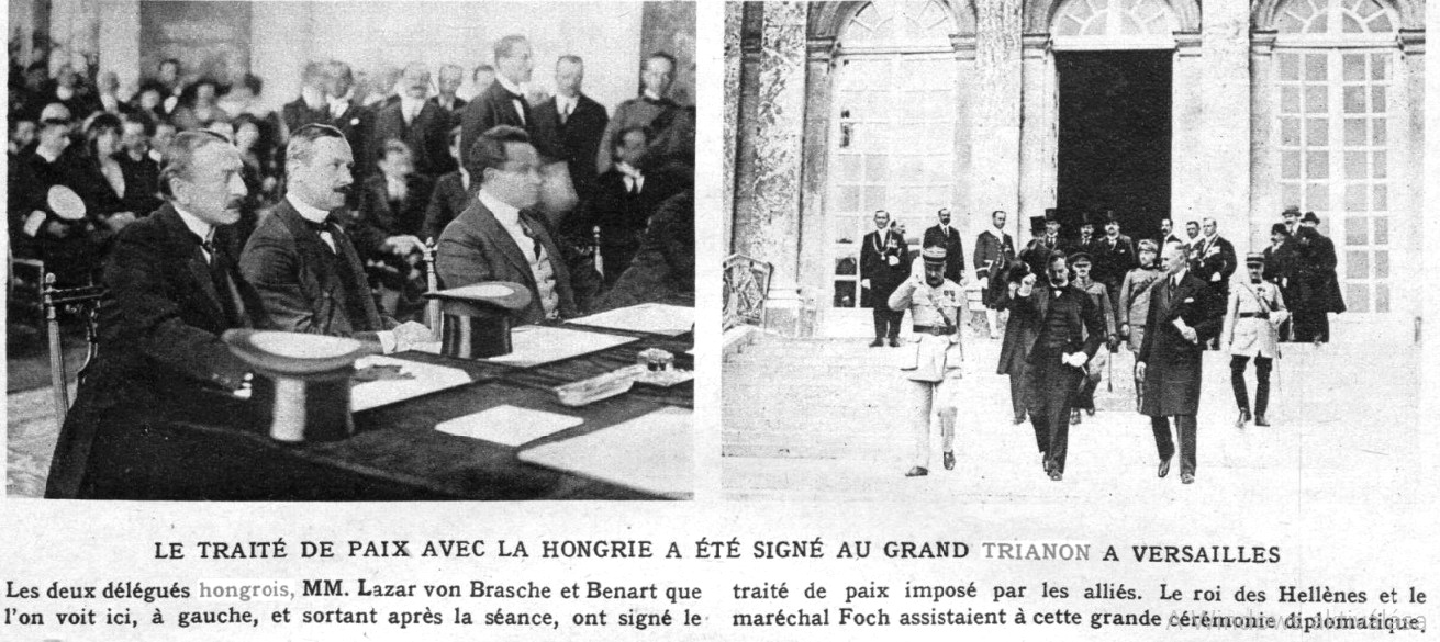 1920-06-13 Le Miroir : publication hebdomadaire